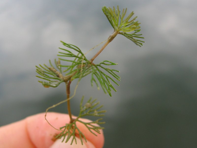 Spreizender WasserHahnenfuß Ranunculus circinatus, Müritz-Gebiet